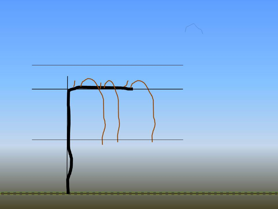 Schematische Darstellung einer Sylvoz-Erziehung